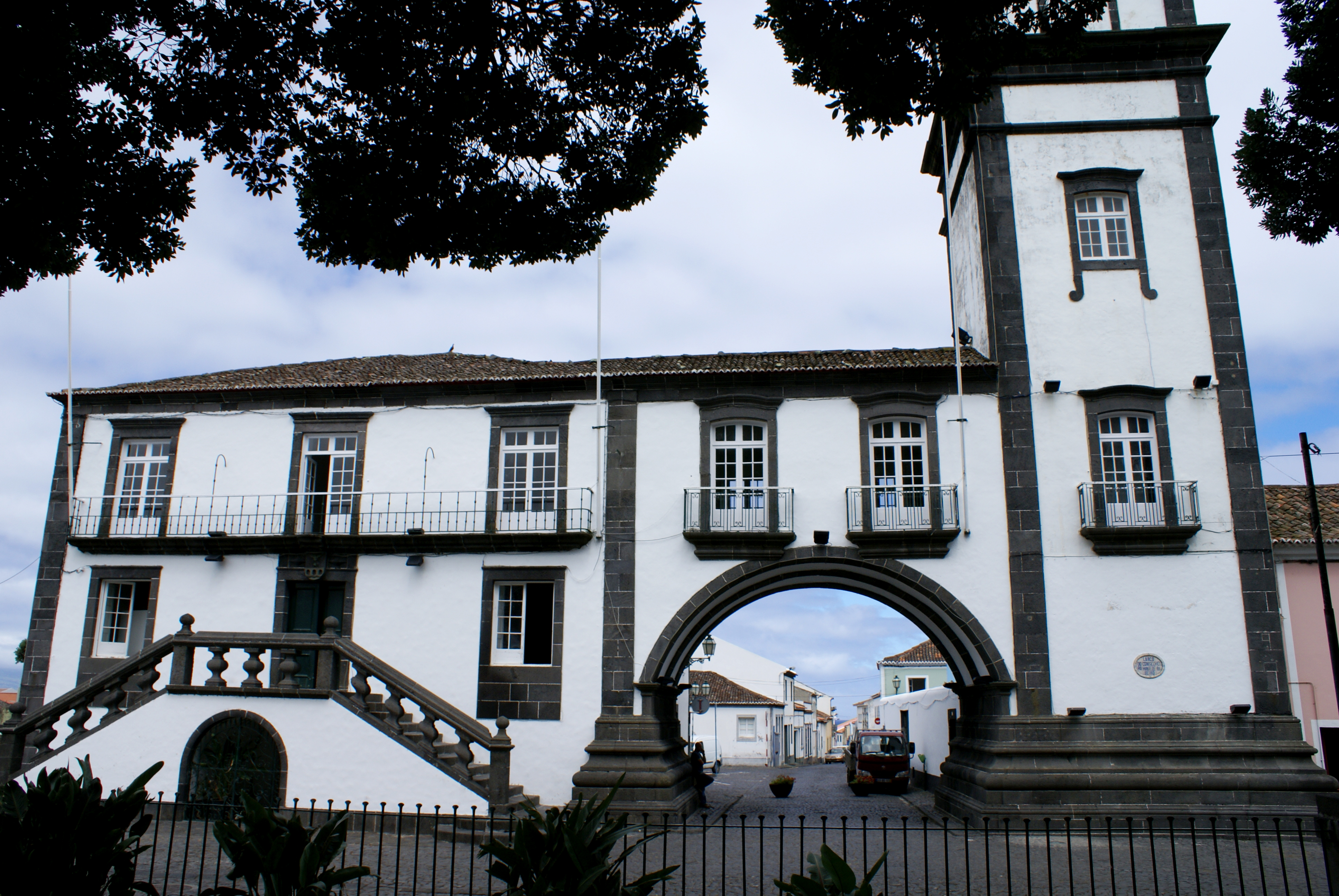 Edifício da Câmara da Ribeira Grande, ilha de São Miguel, Açores